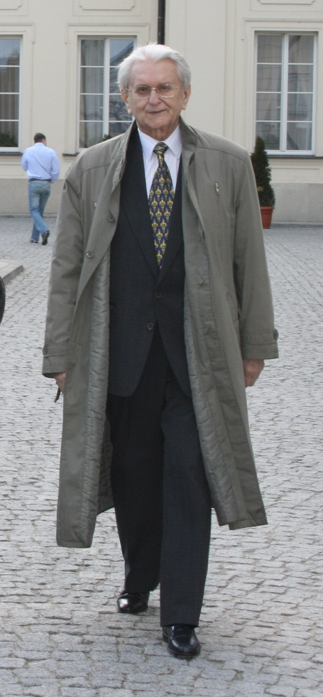 Ceazry Chlebowski po nadaniu mu Orderu Odrodzenia Polski